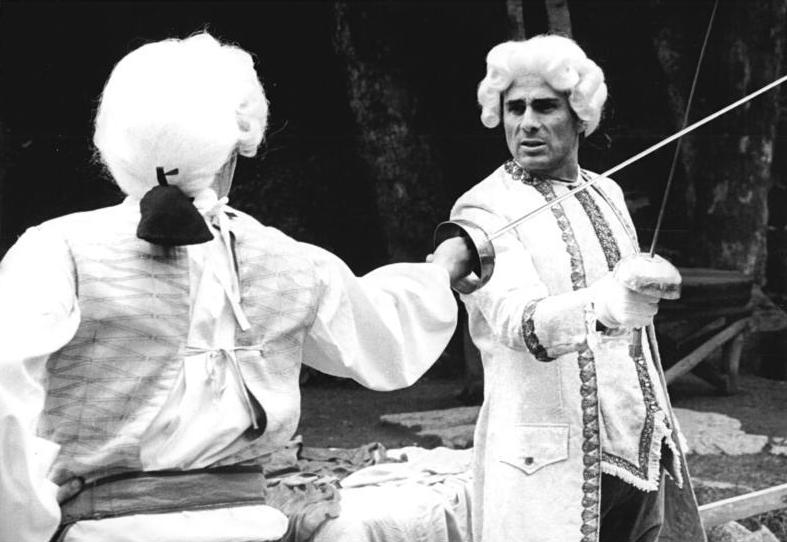 Bergtheater Thale, Gojko Mitic bei Fechtprobe Zum Beitrag: Heiteres Spiel in luftiger Höh` - Hinter den Kulissen des Harzer Bergtheaters ADN-ZB Lehmann - 10.8.1984 Auf der Naturbühne des Harzer Bergtheaters bei Thale. Eine Vormittagsvorstellung ist beendet, so daß die Akteure für ein anderes Stück noch eine Weile ungestört proben können. Gojko Mitic übernahm die Hauptrolle in dem Stück "Rinaldo Rinaldini". Seine Kabinettstücke zu Pferde und mit dem Degen ziehen Tausende in die Naturbühne. Hier probt er mit seinem Widerpart noch einmal eine Fechtszene (rechts). (Hierzu gehören 1984-0810-300 - 302 N) Abgebildete Personen: Mitic, Gojko: Schauspieler, Jugoslawien (GND 118582798)